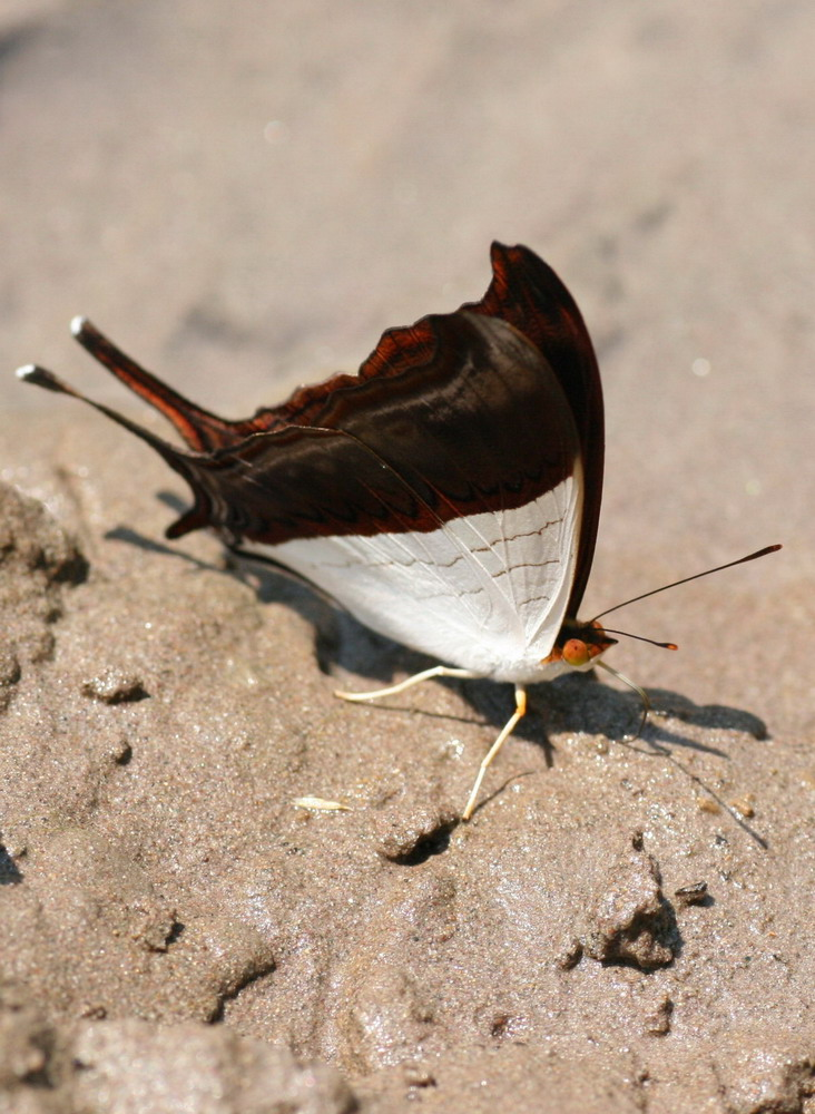 Peru. Tingo-Maria. Aug. 2008